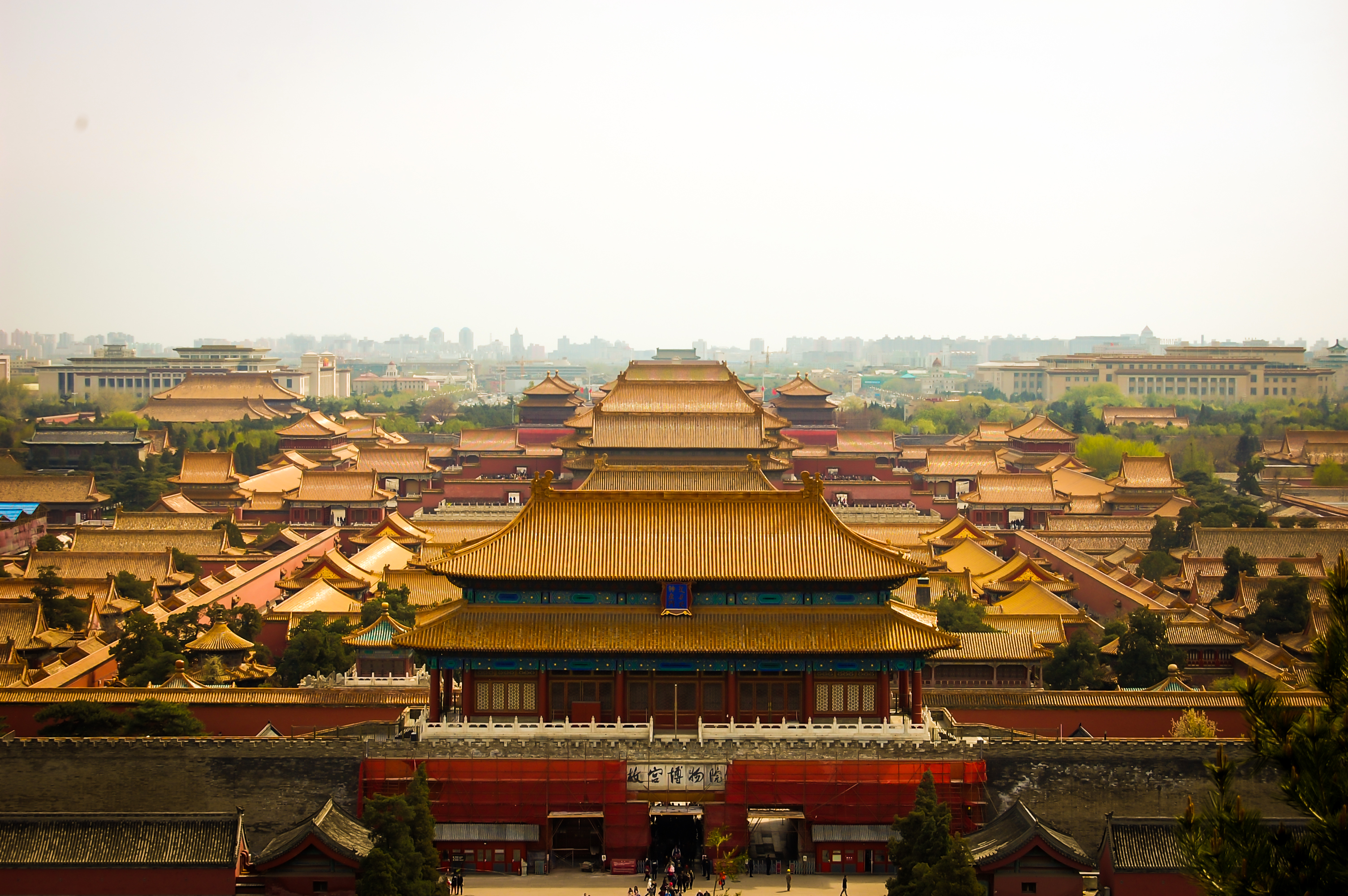 Das Foto wurde von der Aussichtsplattform am Ausgang der Verbotenen Stadt aufgenommen bei gutem Wetter.